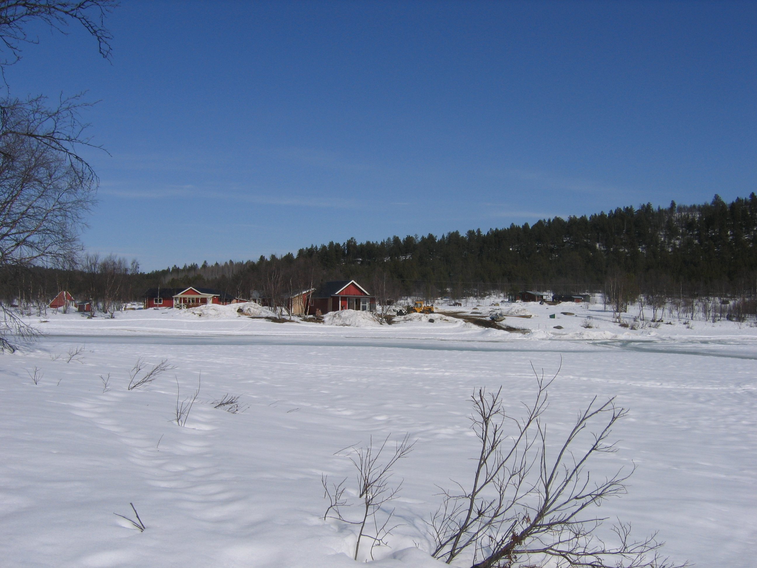 Käyrävuopio, Kiruna kommun, near Krokvik/Geavrovuohppi